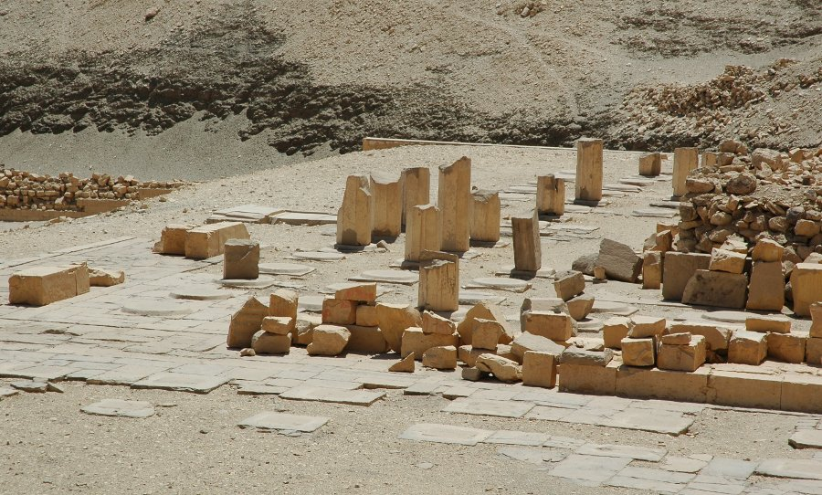 Foto: Reste des Ambulatoriums und rechts davon eine Ecke der Überreste des Kernbaus vom Totentempel des Mentuhotep II. in Deir el-Bahari